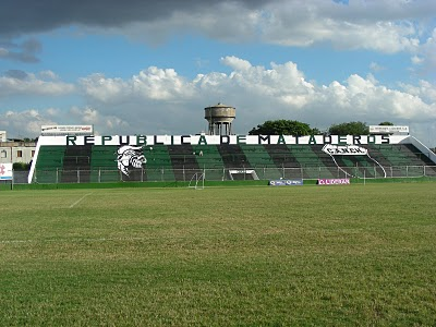 Club Atletico Nueva Chicago